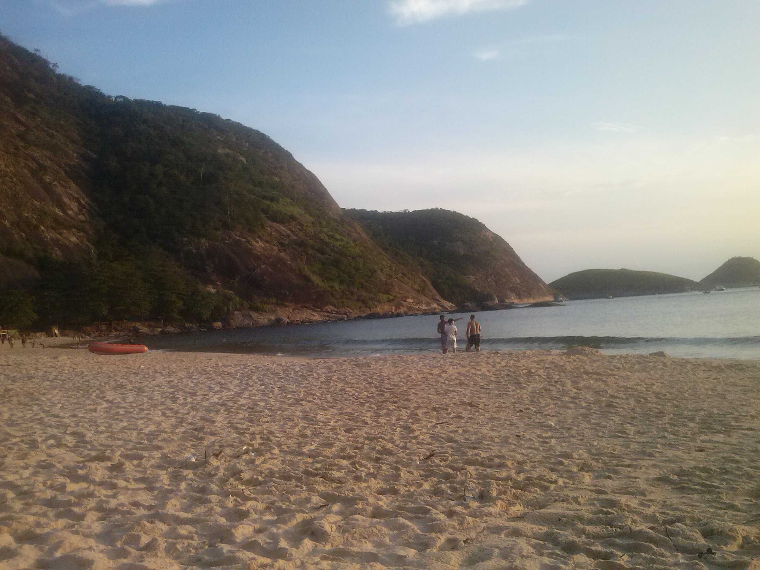 bela praia em niterói